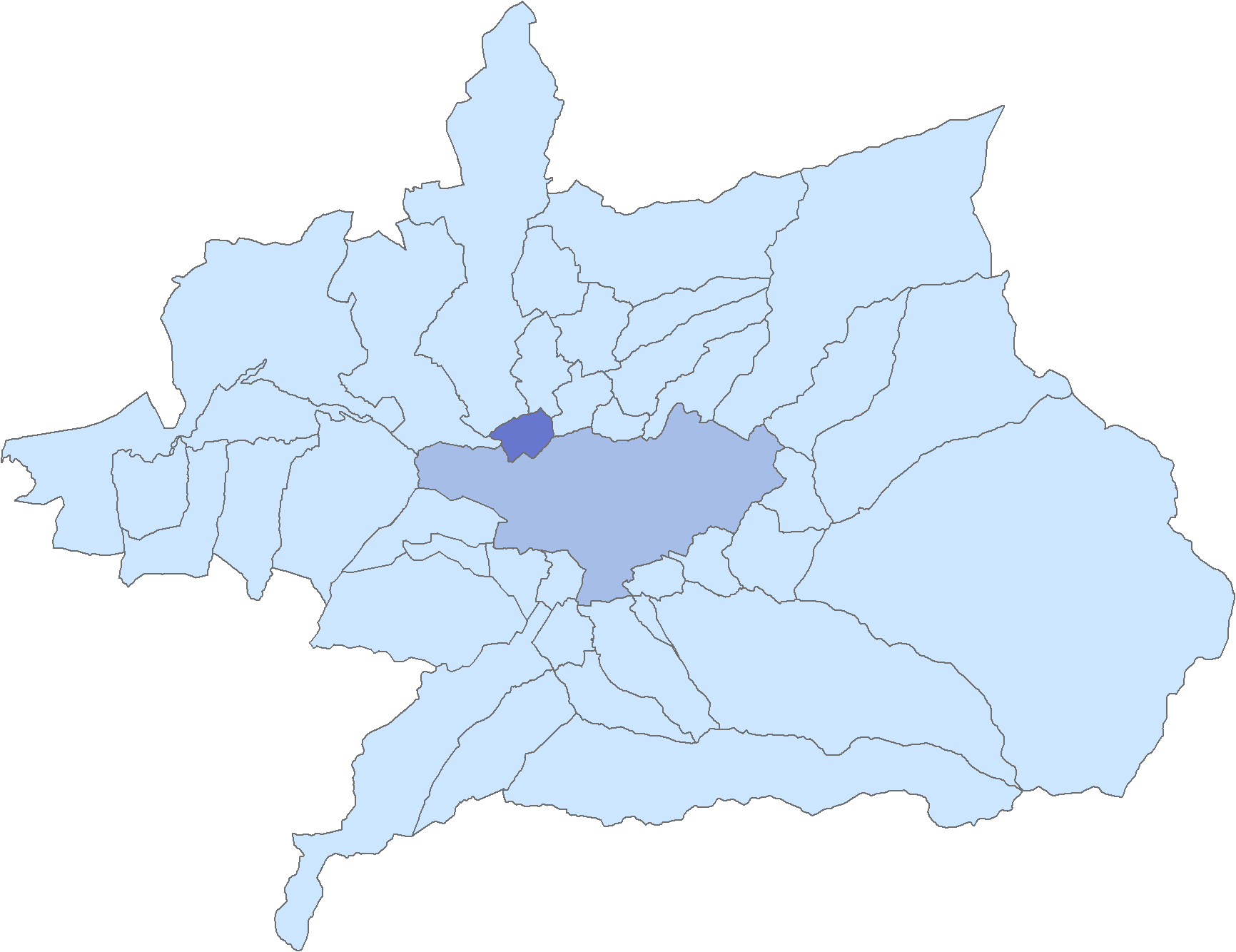 Situación del municipio de Maracena respecto a la comarca de la Vega de Granada, en España.